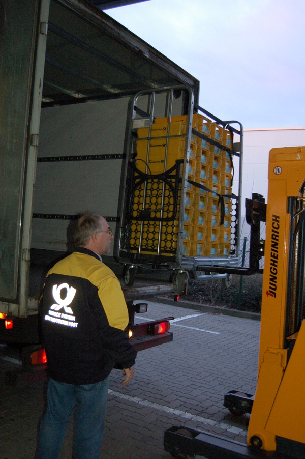 Abholung der DVDs beim DVD-Verleih